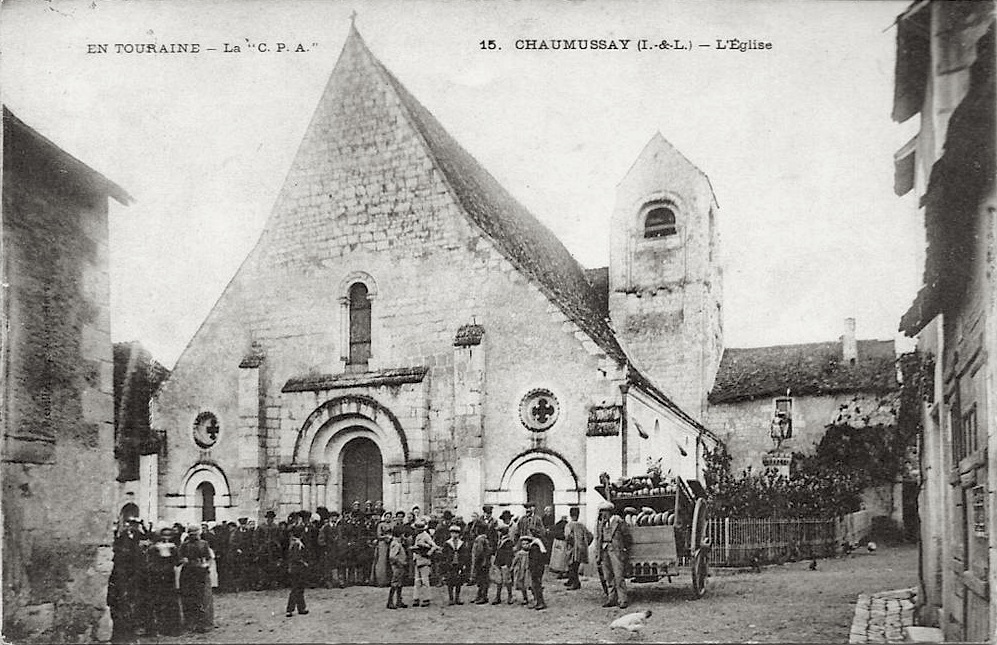 Eglise St Médard de Chaumussay, vers 1900